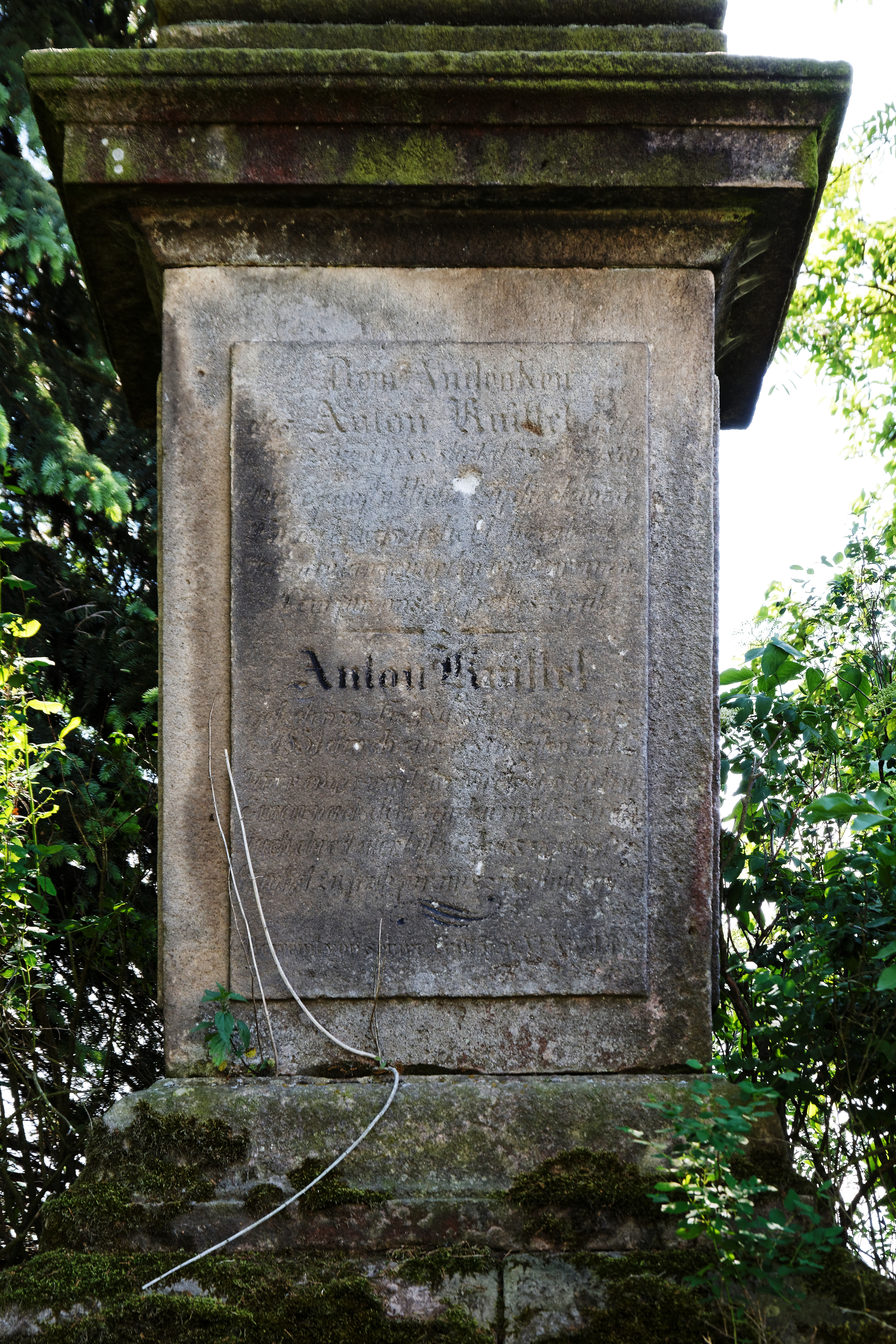 Rožmitál, Broumov, obelisk za usedlostí čp. 6, detail nápisu.